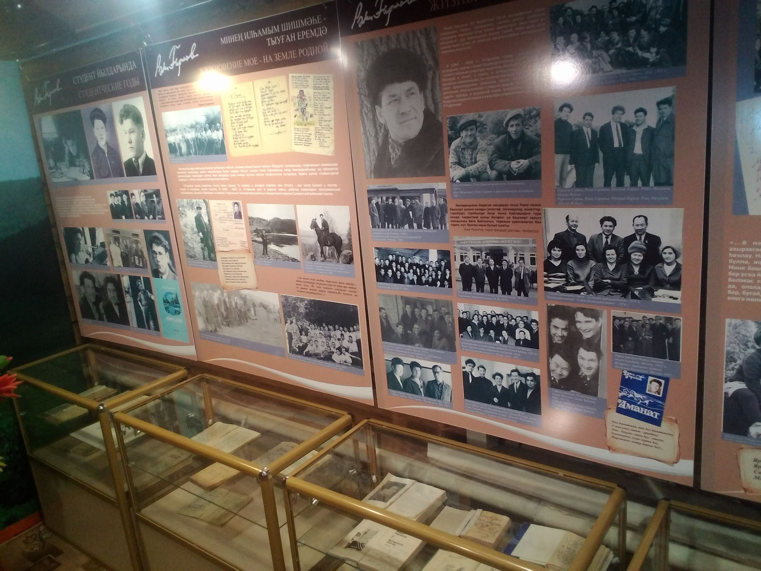 Музей Рамі Гаріпова